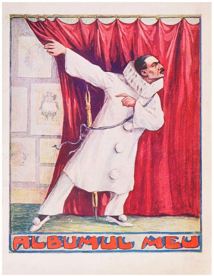 Coperta la Albumul meu